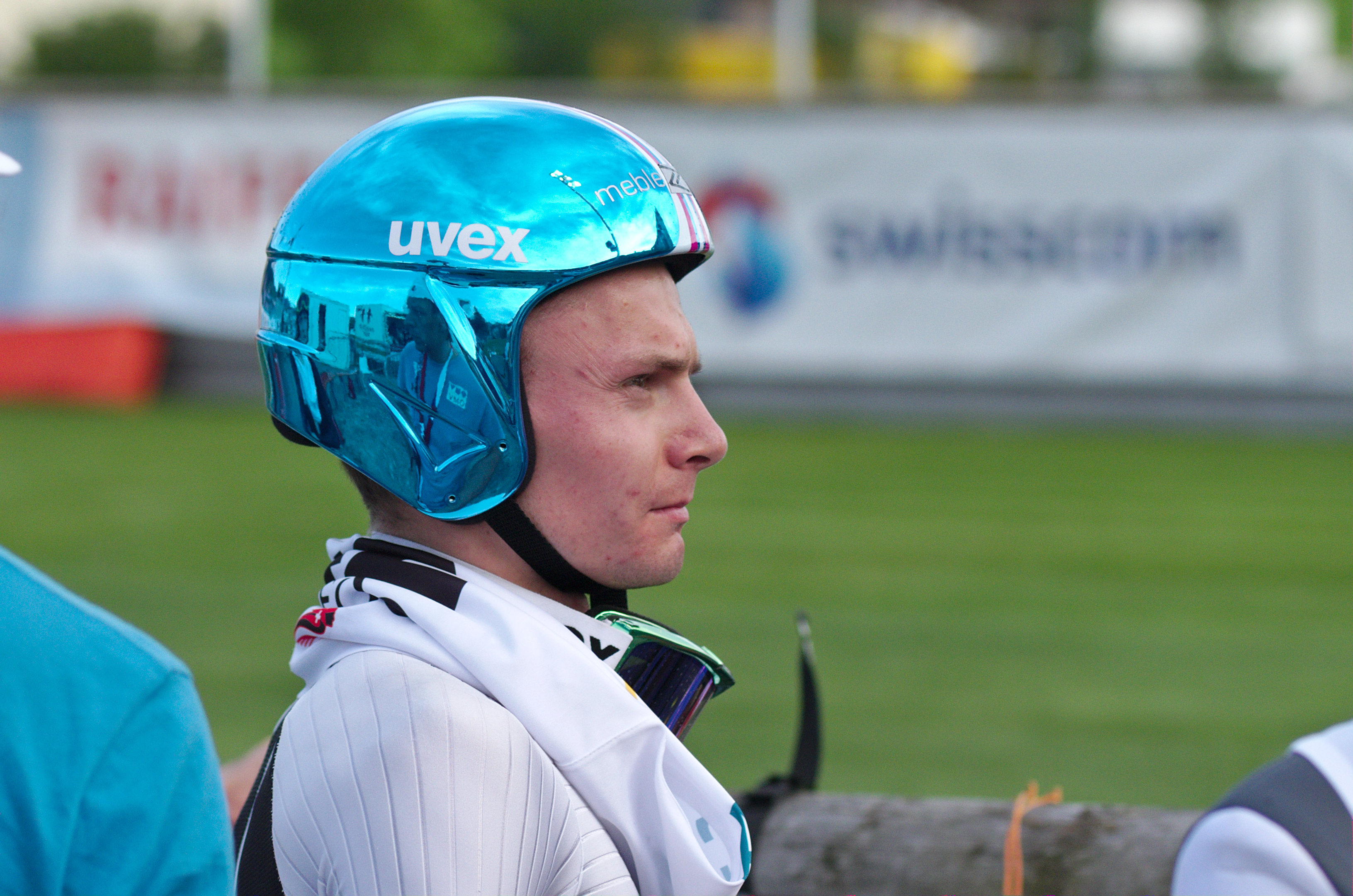 FIS Sommer Grand Prix 2014 - 20140809 - Jan Ziobro